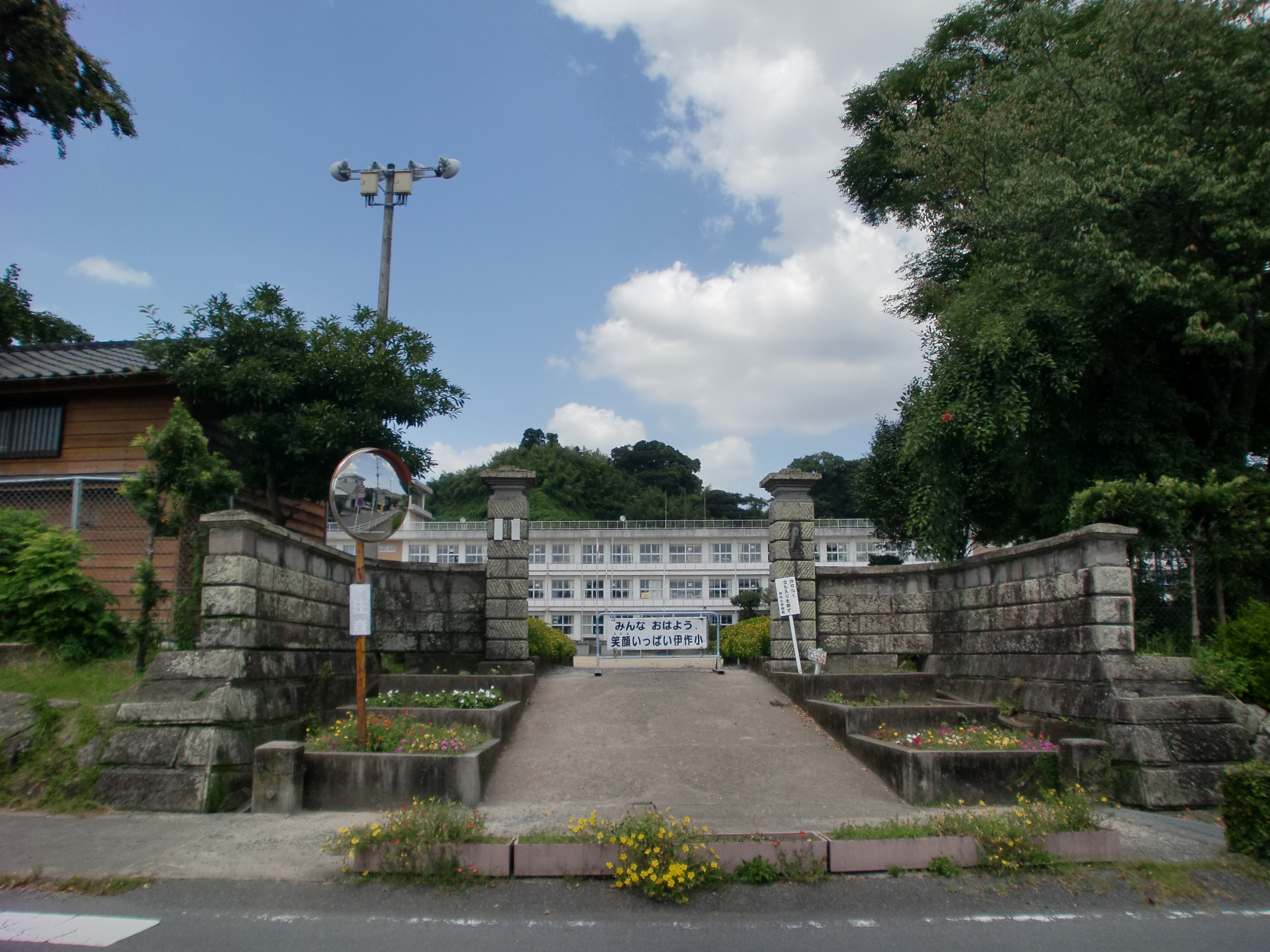 日置市立伊作小学校の外観。